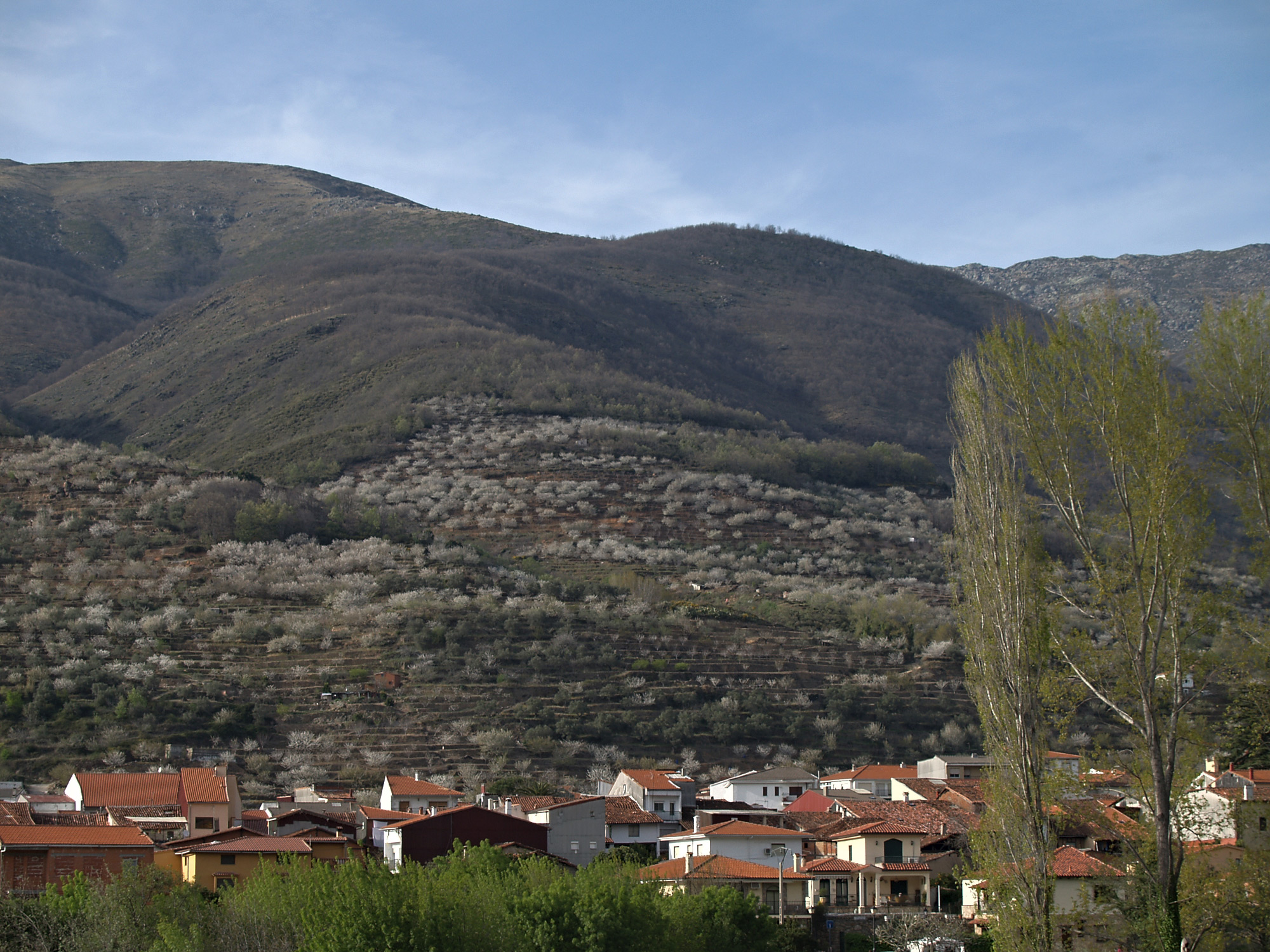 Jerte, Cáceres, con los cerezos en flor al fondo.